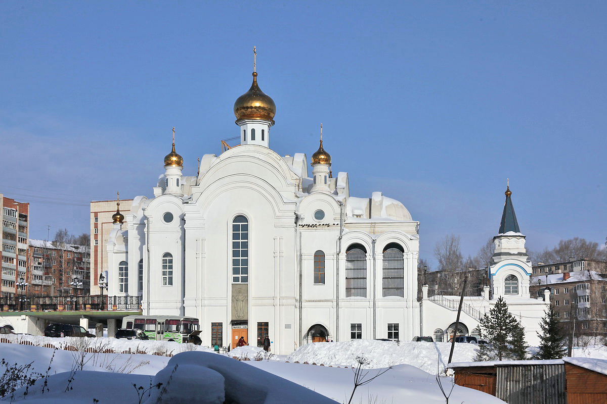 Кафедральный собор Серафима Саровского в г. Златоуст Cathedral of Seraphim of Sarov, City of Zlatoust